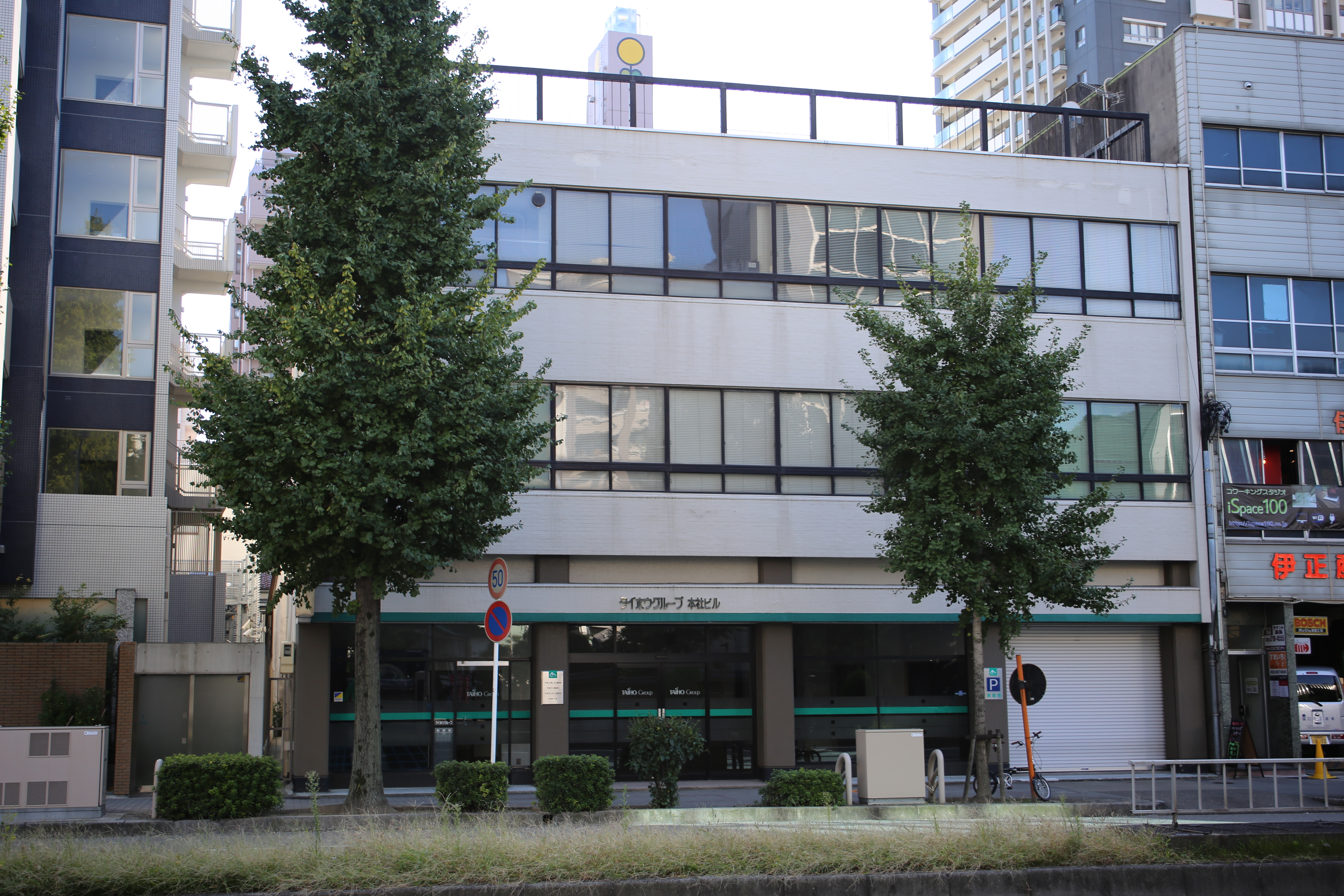 名古屋市中区上前津二丁目のタイホウグループ本社を北側公道西側より撮影